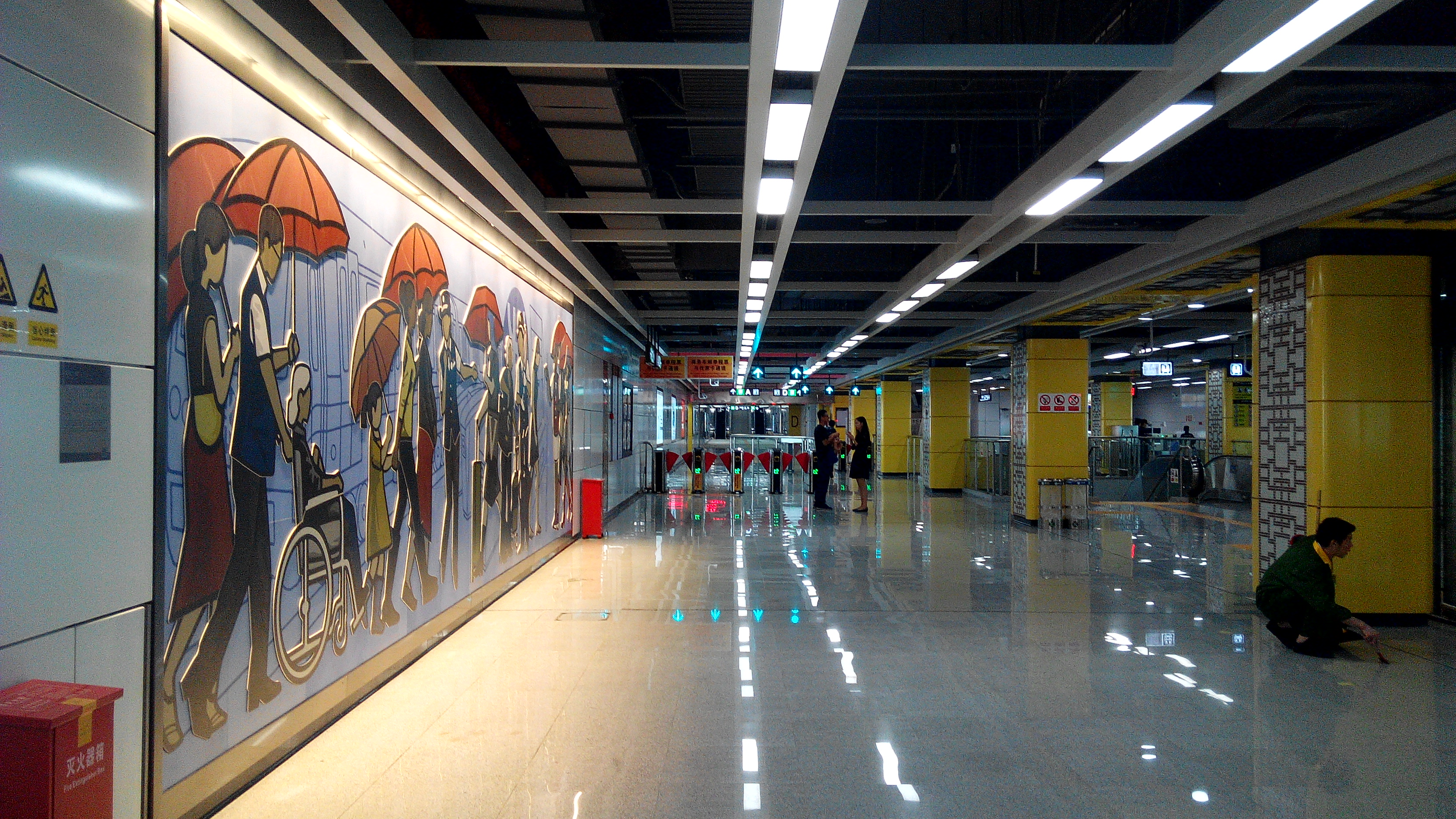 深圳地铁9号线 鹿丹村站站厅